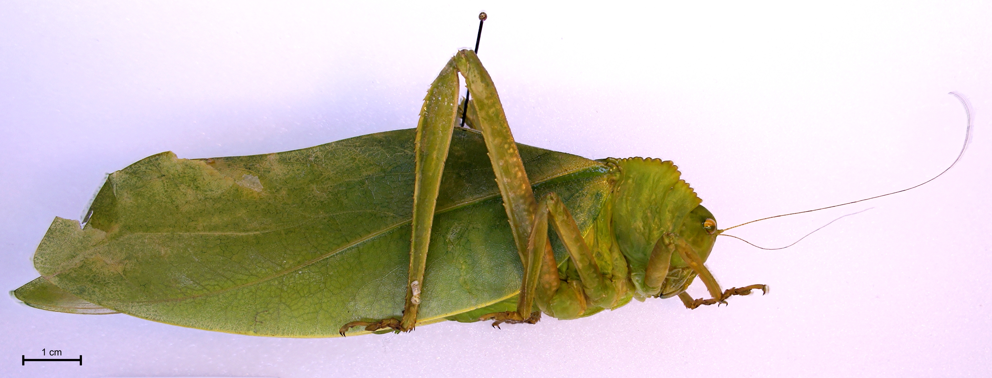 Steirodon ponderosum (Stål, 1873) Herkunft: Peru, Panguana det. by Oscar Cadena 2015